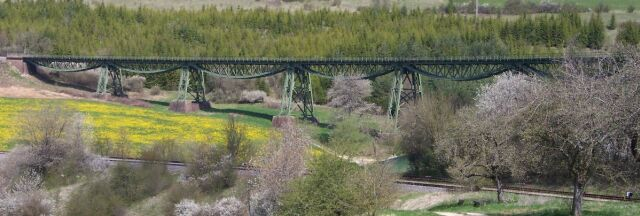 Biesenbach Viadukt der Wutachtalbahn, eigenes Bild.